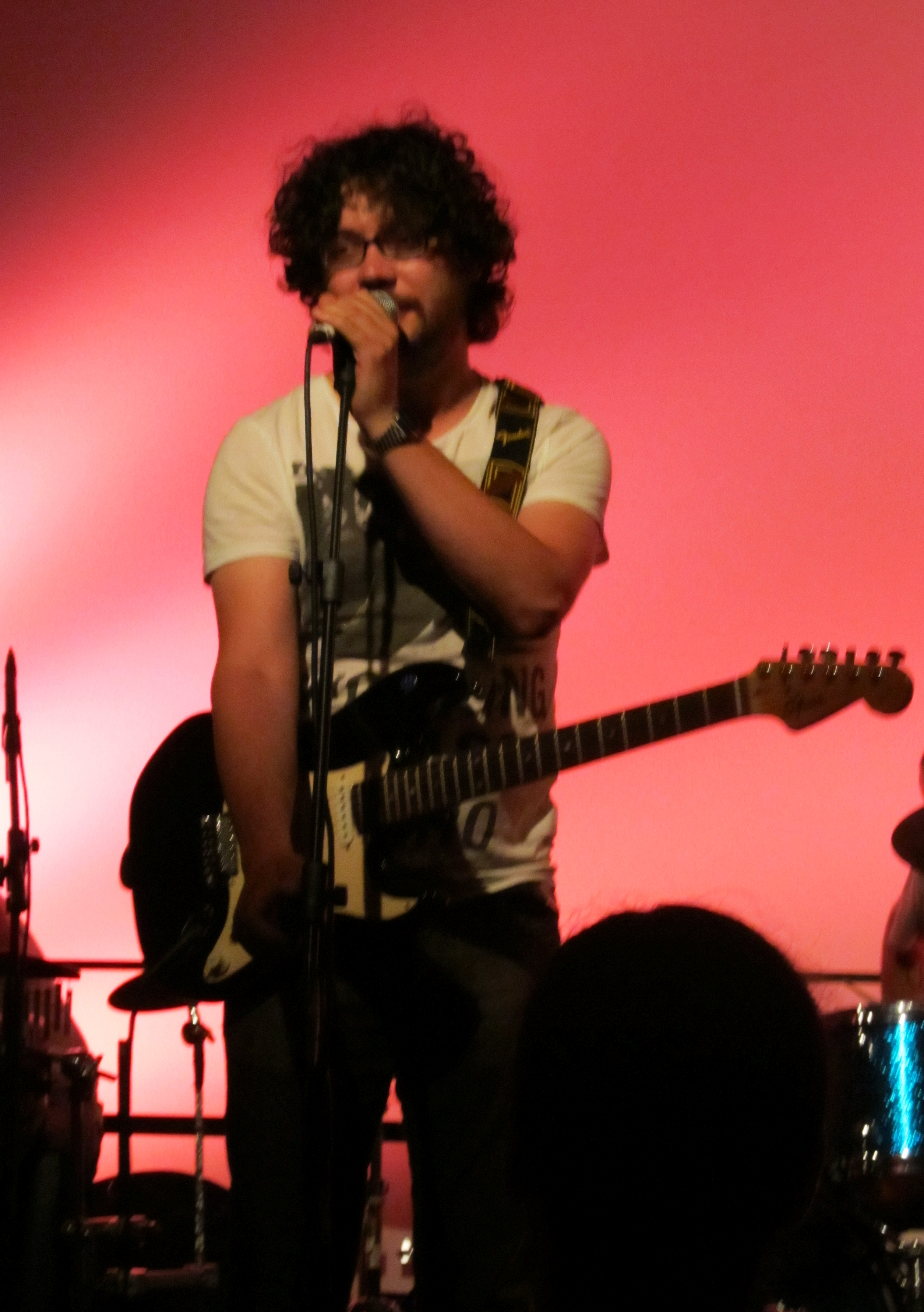 Concerto Artisti valdostani per l'Emilia (Cittadella di Aosta, 8 luglio 2012): Alberto Visconti (L'Orage)